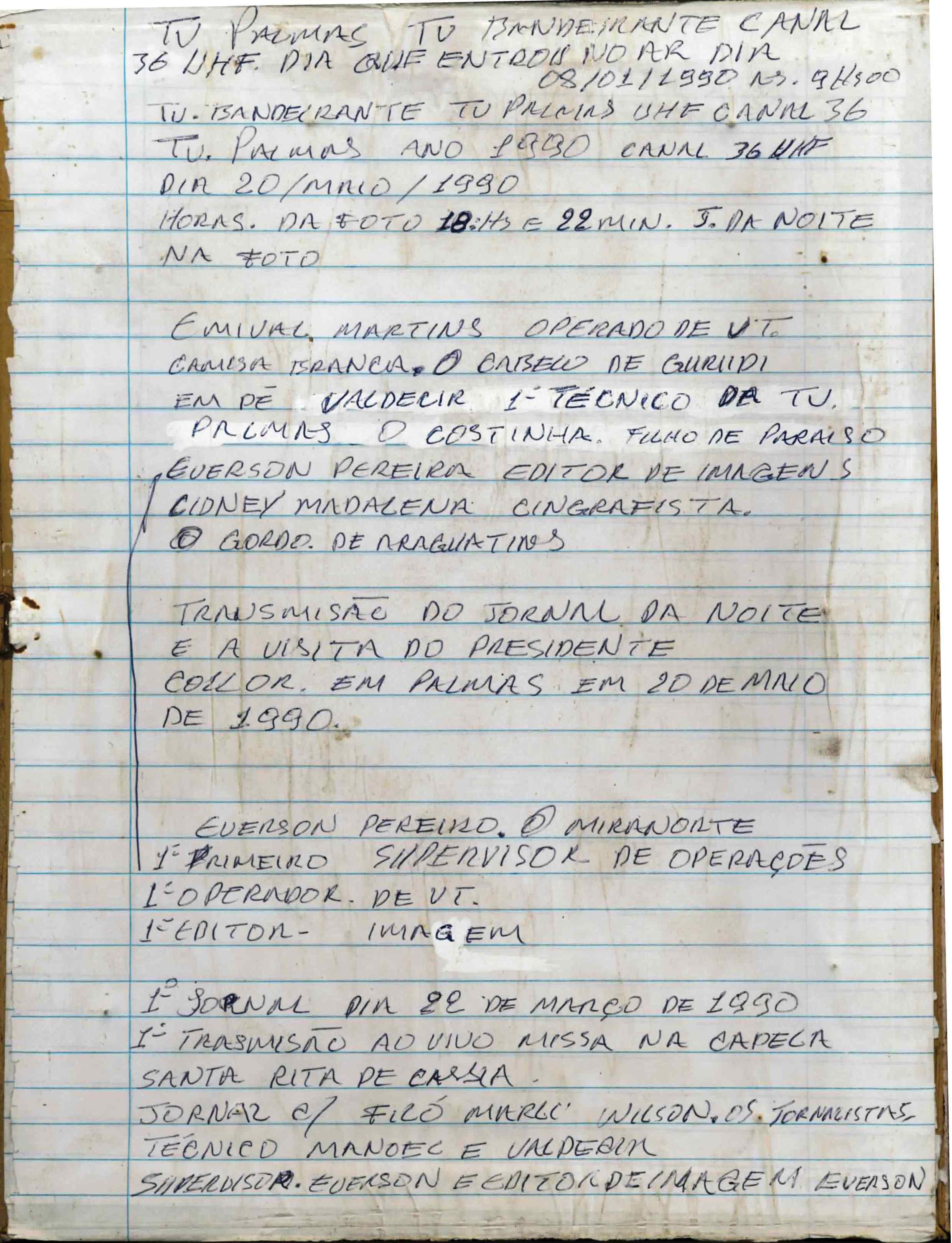 Carta de próprio punho escrita em 08 de janeiro de 1990,relatando a primeira transmissão da Tv Palmas,em Palmas, Tocantins, Brasil.